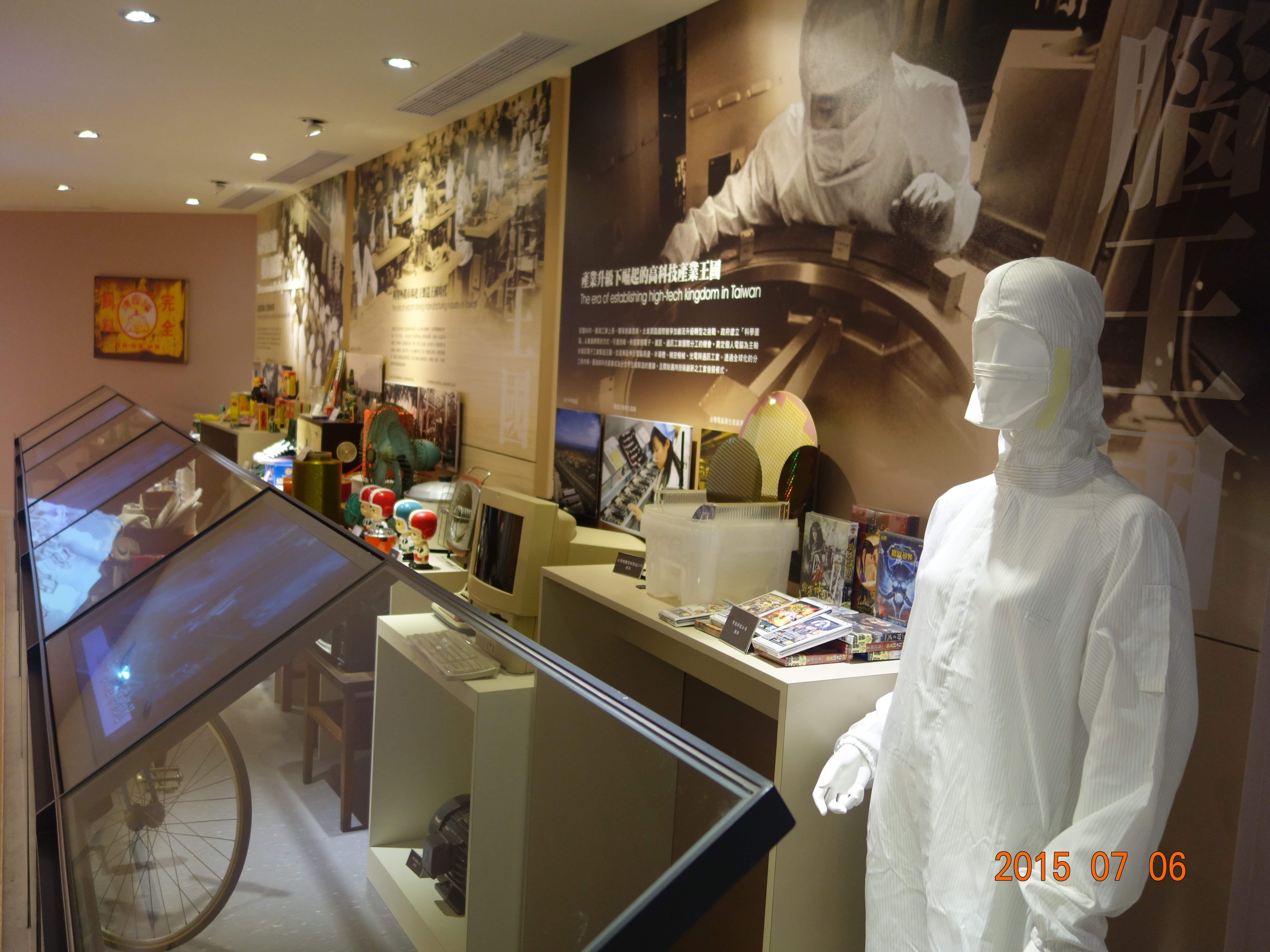 臺灣股票博物館臺灣經濟發展歷程展示區，展示品由大同公司、東元電機、台積電、智冠科技等提供。